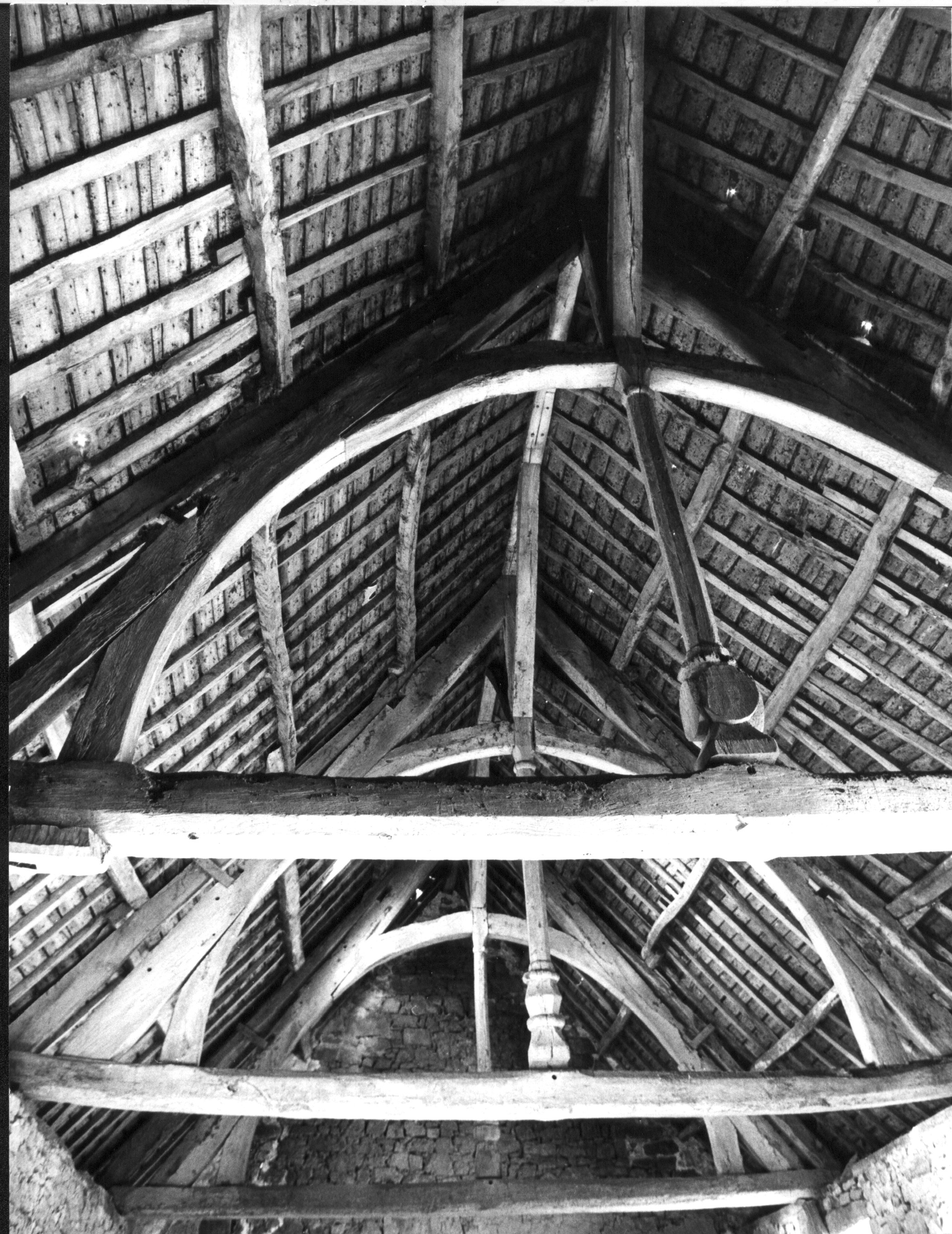 Une vue d'ensemble (3 fermes sur 4) depuis le plancher de l'étage.